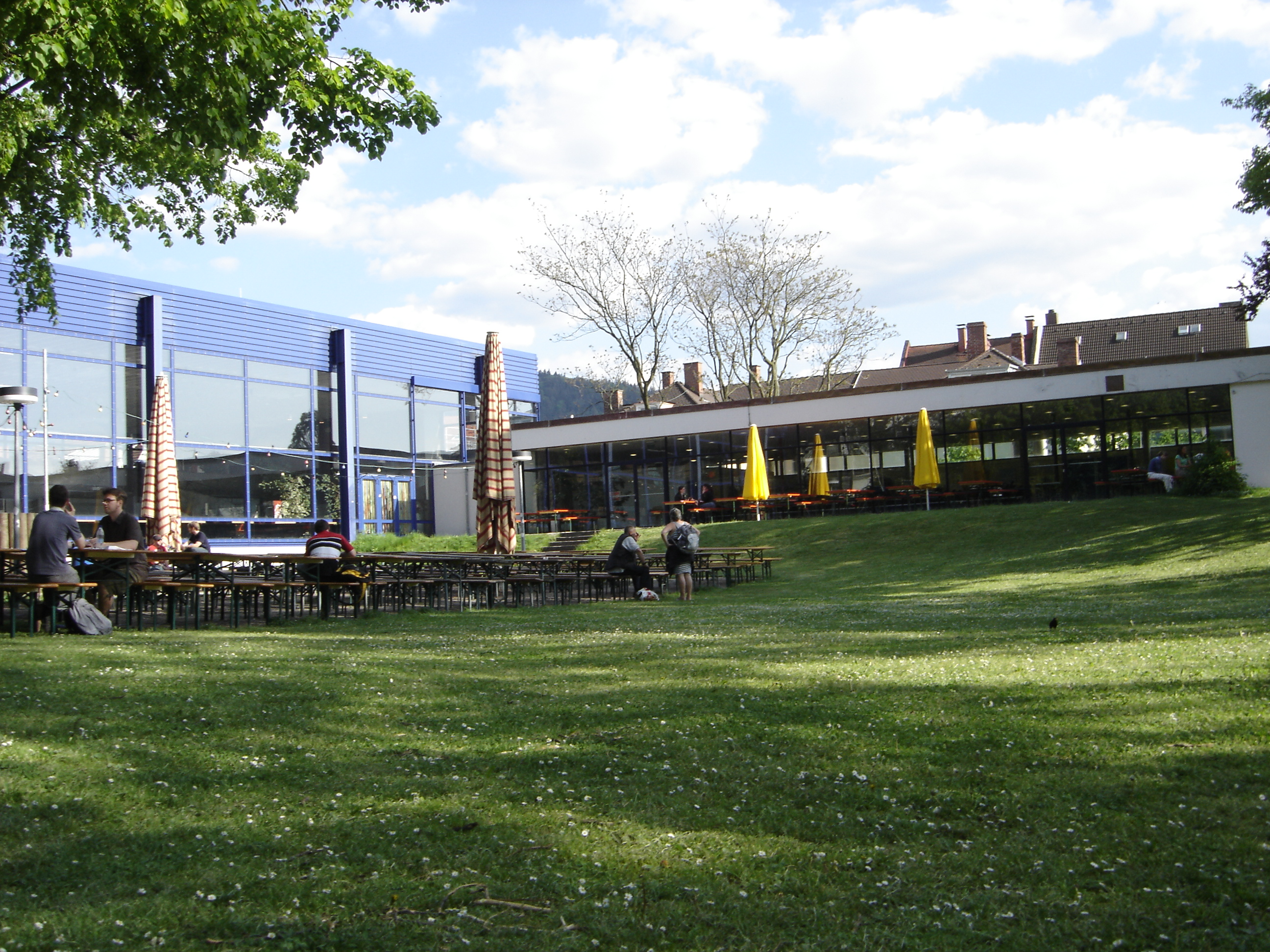 Mensa mit Mensawiese